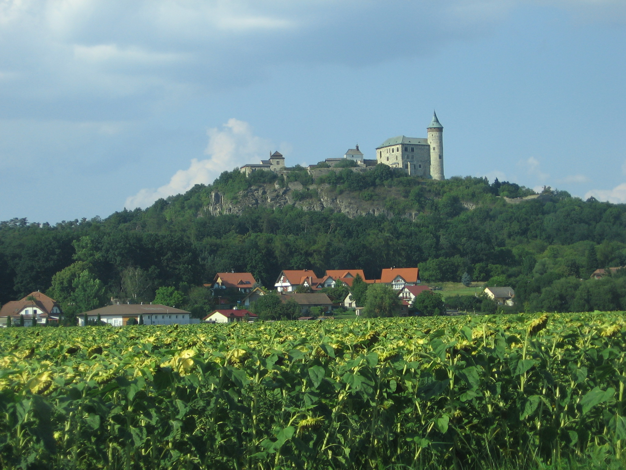 Kunětická hora, Ráby 6, Ráby.